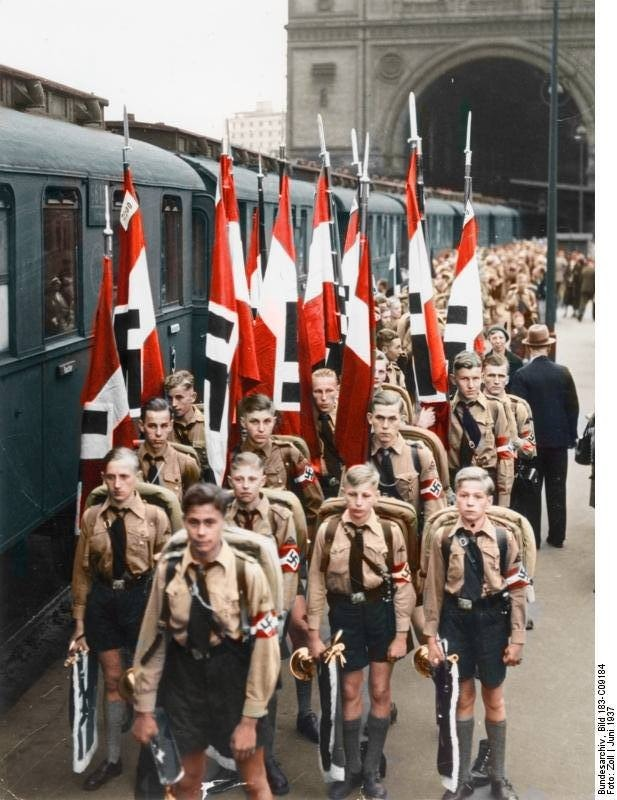 Scherl: Berliner HJ fährt ins Sommerlager. Am Freitag abend fuhren die Hitlerjungen des Bannes 200, Steglitz/Tempelhof, vom Anhalter Bhf. aus ins Sommerlager nach Meersburg am Bodensee UBz Die HJ ist mit den Bannfahnen auf dem Bahnsteig aufmarschiert. Photo Zoll C 9184 ADN-Bildarchiv: Im faschistischen Deutschland 1933-45 Hitlerjungen des Bannes 200 (Steglitz/Tempelhof) mit ihren Bannfahnen auf dem Anhalter Bahnhof in Berlin vor der Abfahrt ins Sommerlager nach Meersburg am Bodensee. Aufnahme: Zoll / Ende Juni 1937 8315-37 C 9184